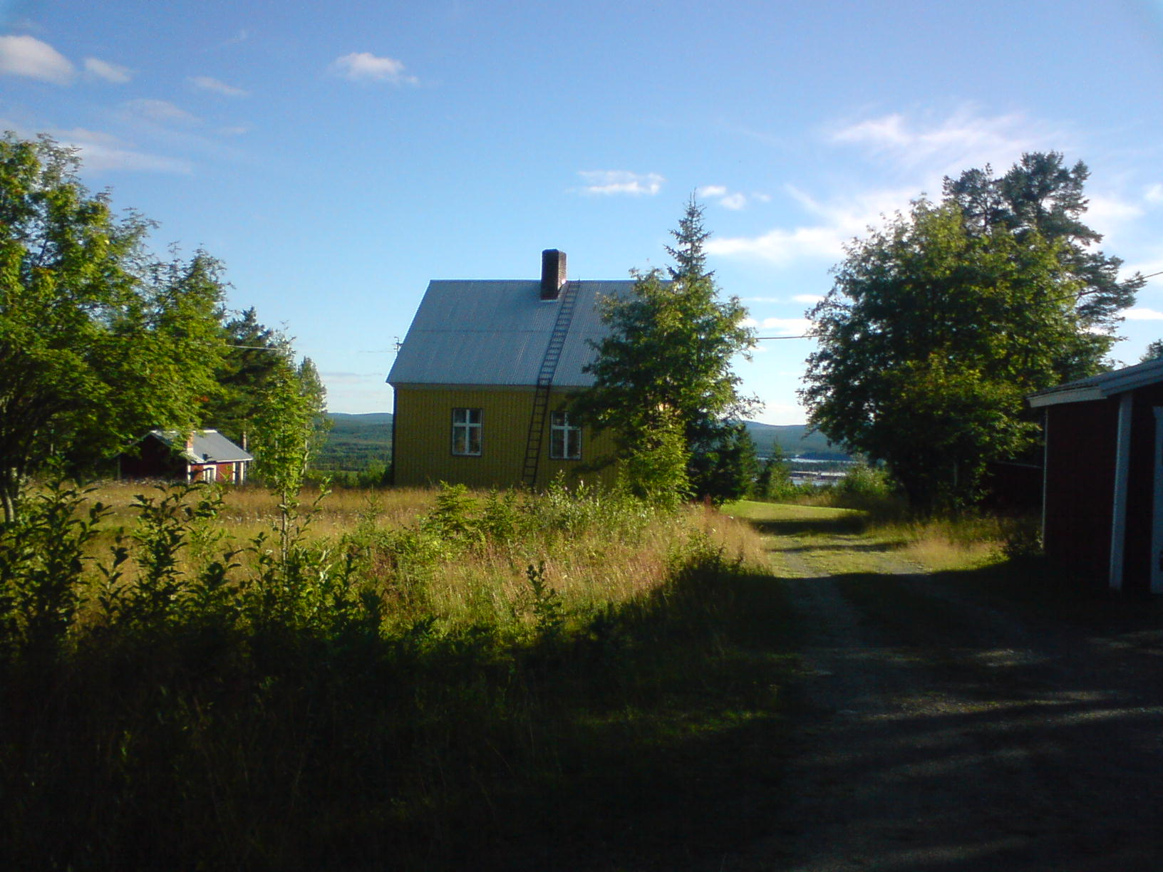 Torgny Lindgrens barndomshem, Raggsjö, Västerbotten, sommaren 2008